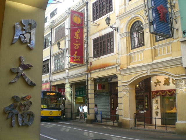 周大福珠寶金行 at 亞美打利庇盧大馬路 (新馬路), Avenida de Almeida Ribeiro Author= Mo707